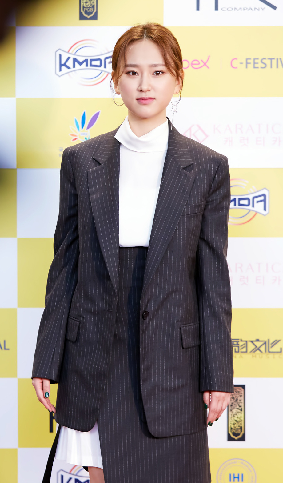 춘사영화제 류혜영.